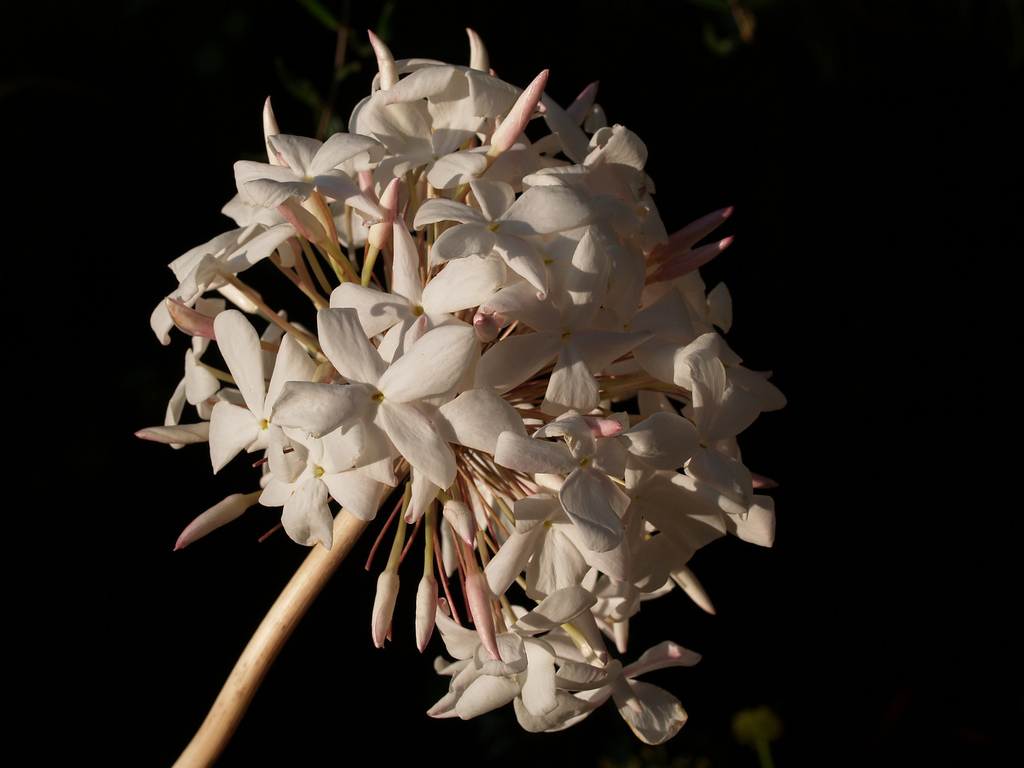 Biznaga, la flor representativa de Málaga, España.